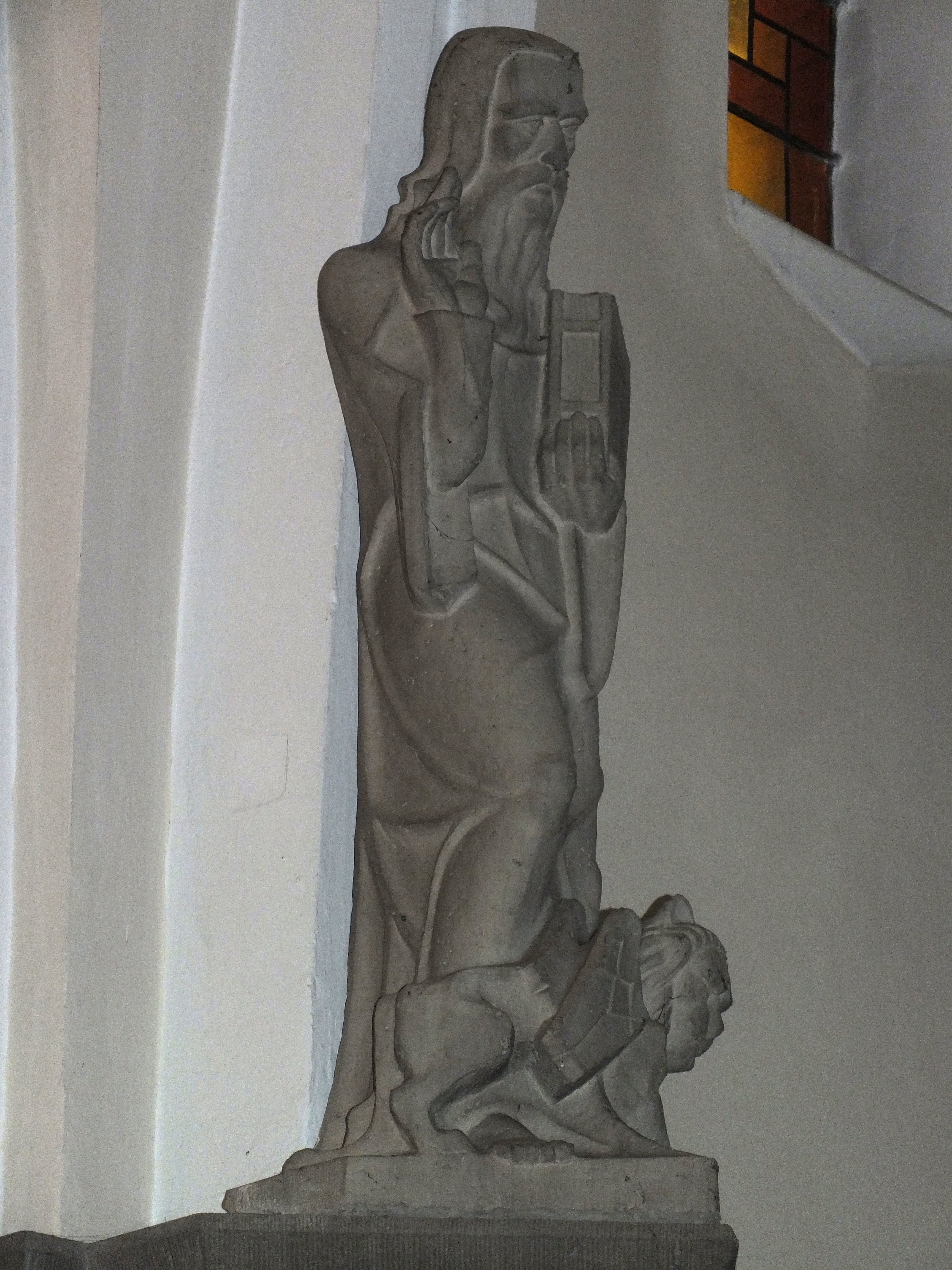 Kirche Maria Magdalena, Berlin-Niederschönhausen: Evangelist Markus; aufgehellt